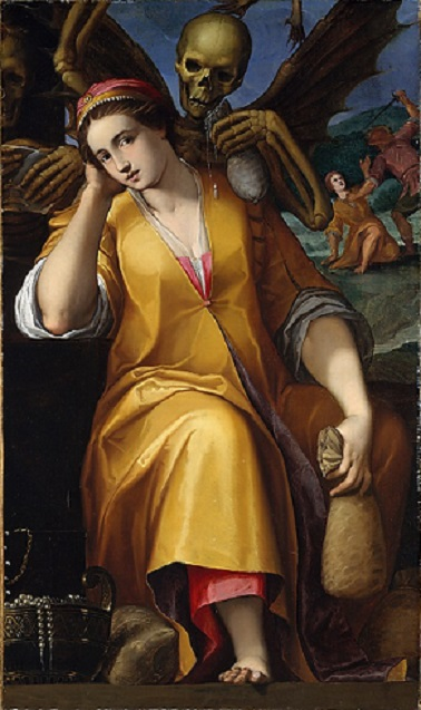 Allegoria dell'avarizia, olio su tela, New York, Metropolitan Museum of Art